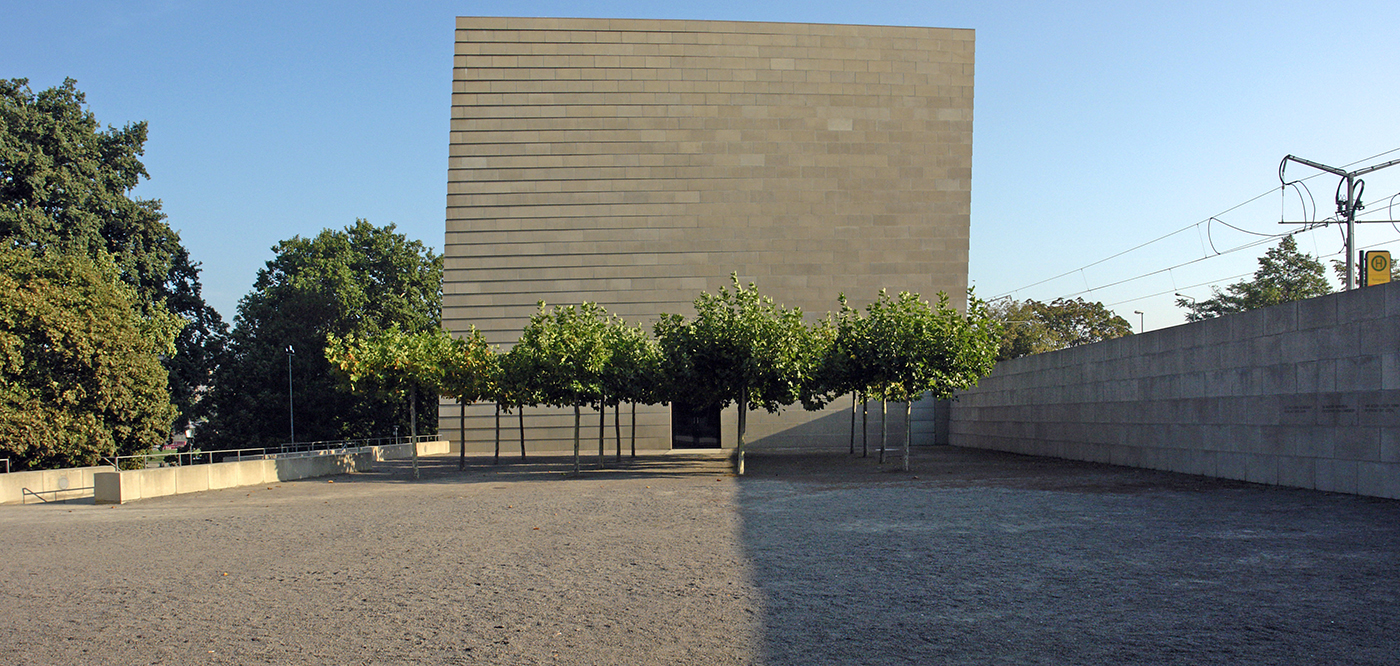 Dresden, Synagoge